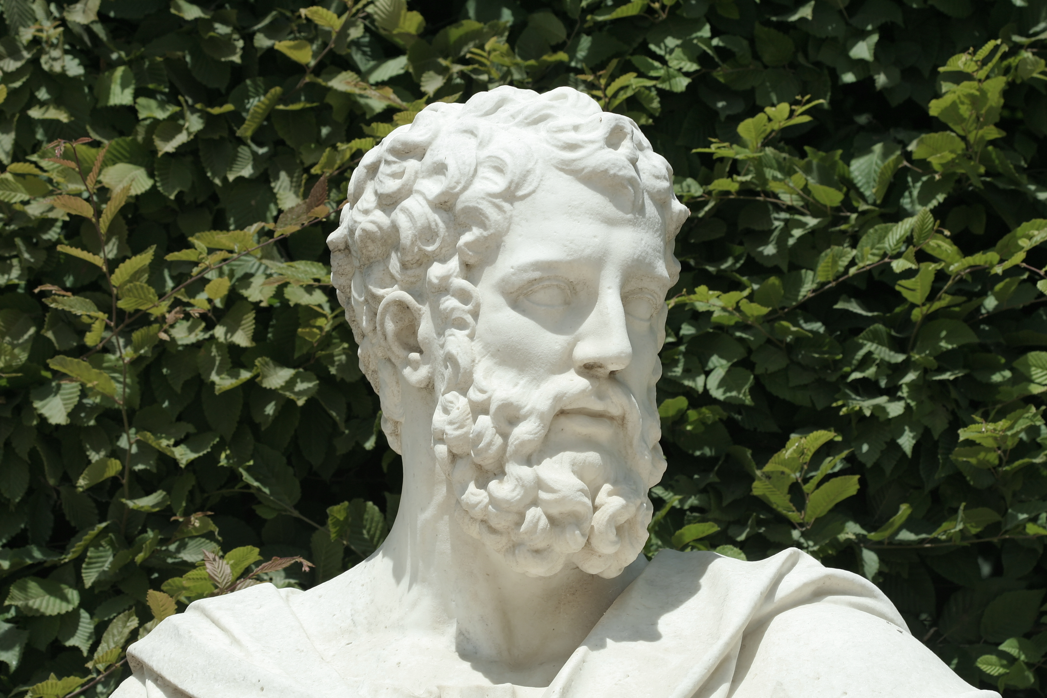 Parc de Versailles, Rond-Point des Philosophes. Apollonius de Tyane en terme, Barthélémy de Mélo (1685-1687), marbre. inv1850n°9449